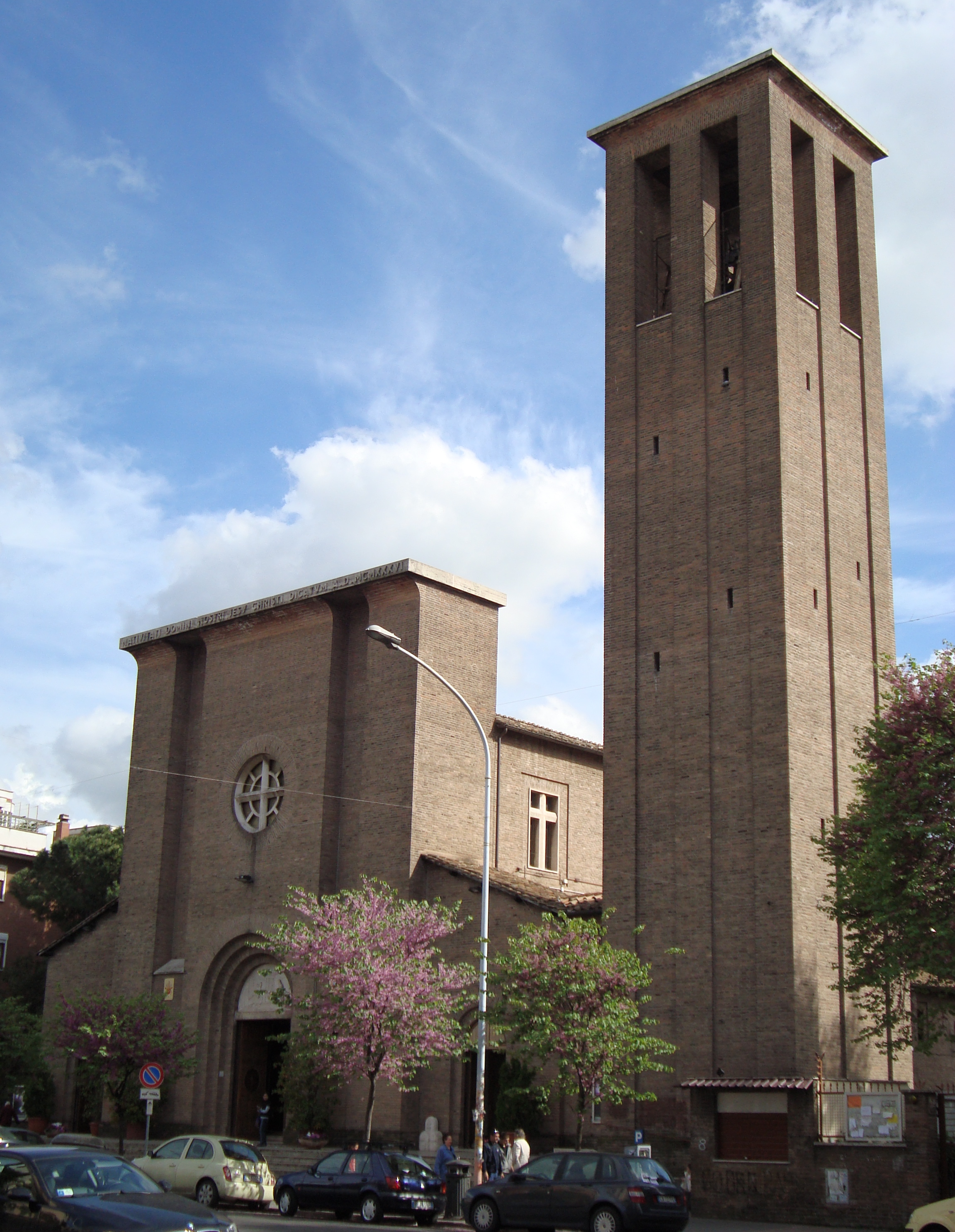 Eglise de la Natività di Nostro Signore Gesù Cristo (Rome - Appio Latino)